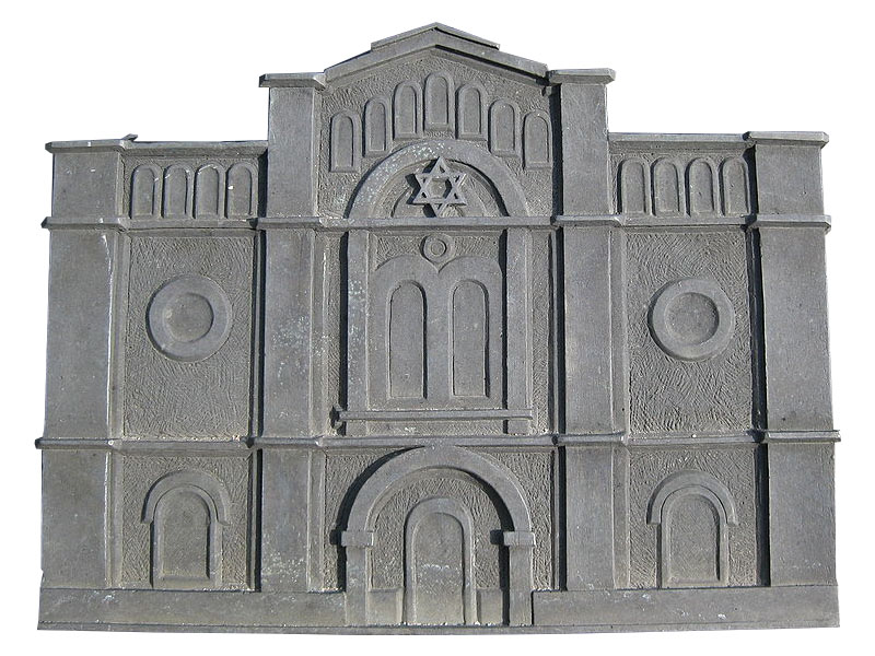 Synagoga we Wrześni